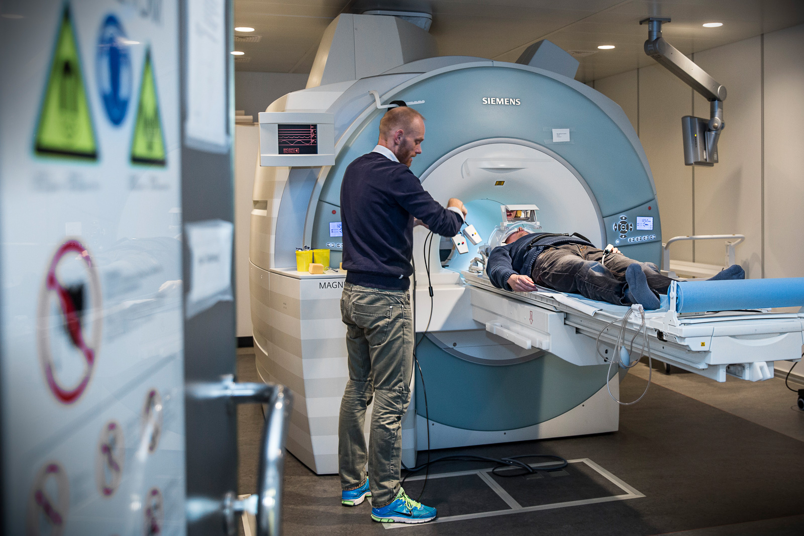 En MR-skanner på Aarhus Universitetshospital.